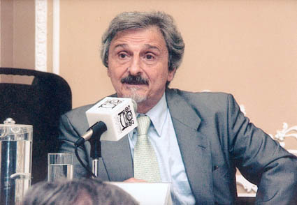 Roberto Francisco Alifano